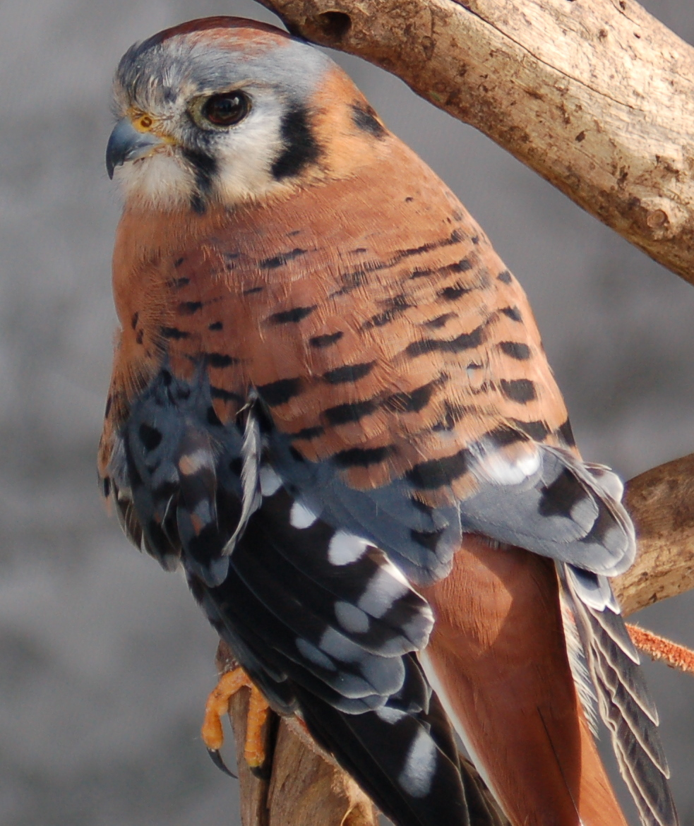 An American Kestrel (Falco sparverius).